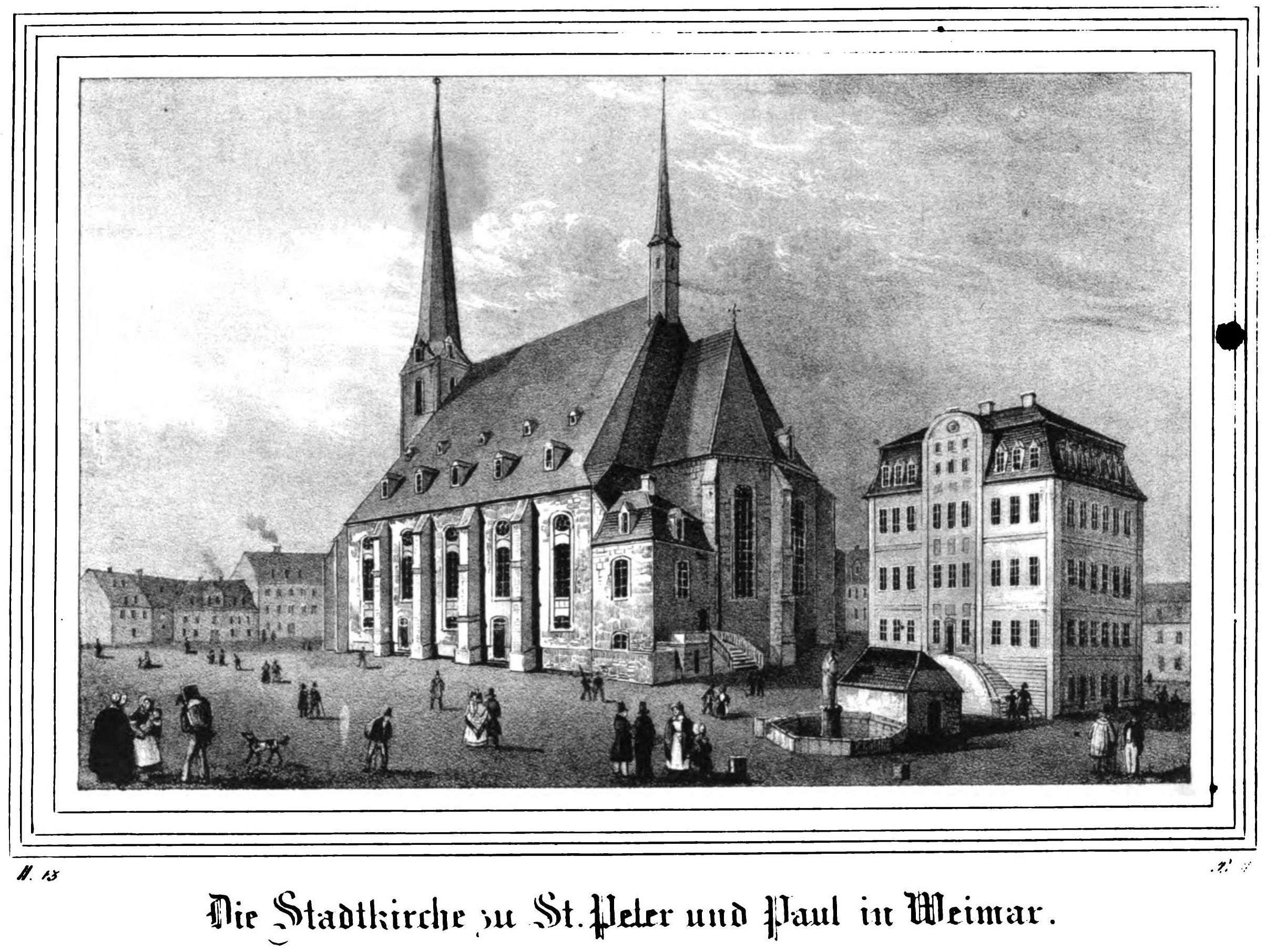 Saxonia Museum für saechsische Vaterlandskunde. Band 2. Dresden: Pietzsch und Comp. Siehe File:Saxonia Museum für saechsische Vaterlandskunde II.djvu